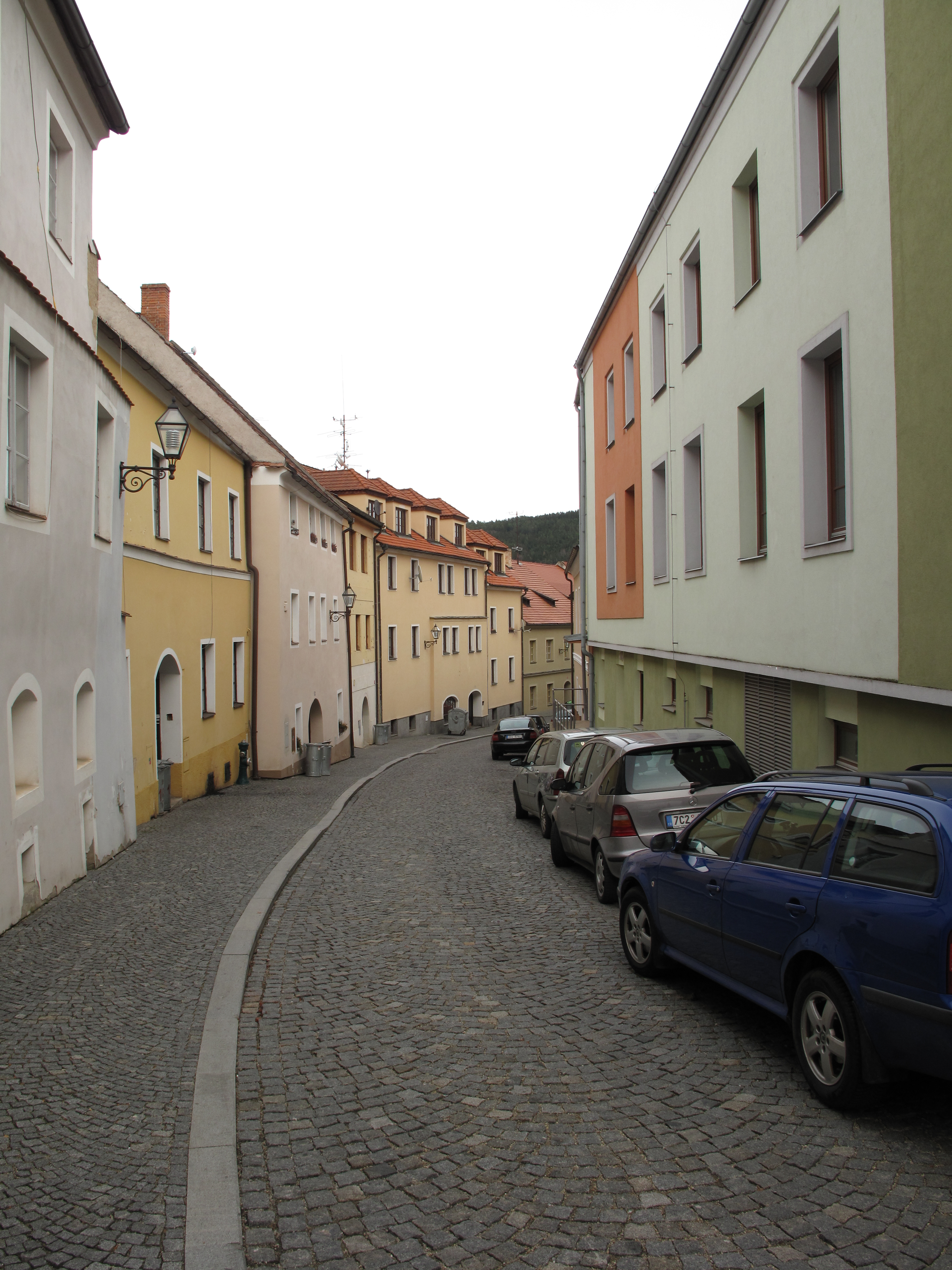 Ulice Neumannova v Prachaticích. Česká republika.